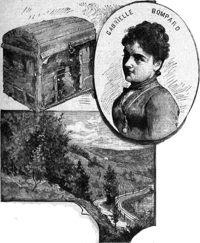 L'Affaire Gouffé. La malle dans laquelle a été transporté le cadavre. - Vue de Millery. - Gabriel Bompard, maîtresse d'Eyraud, l'assassin présumé. Supplément littéraire illustré du Petit Parisien, 15 décembre 1889, p. 1.